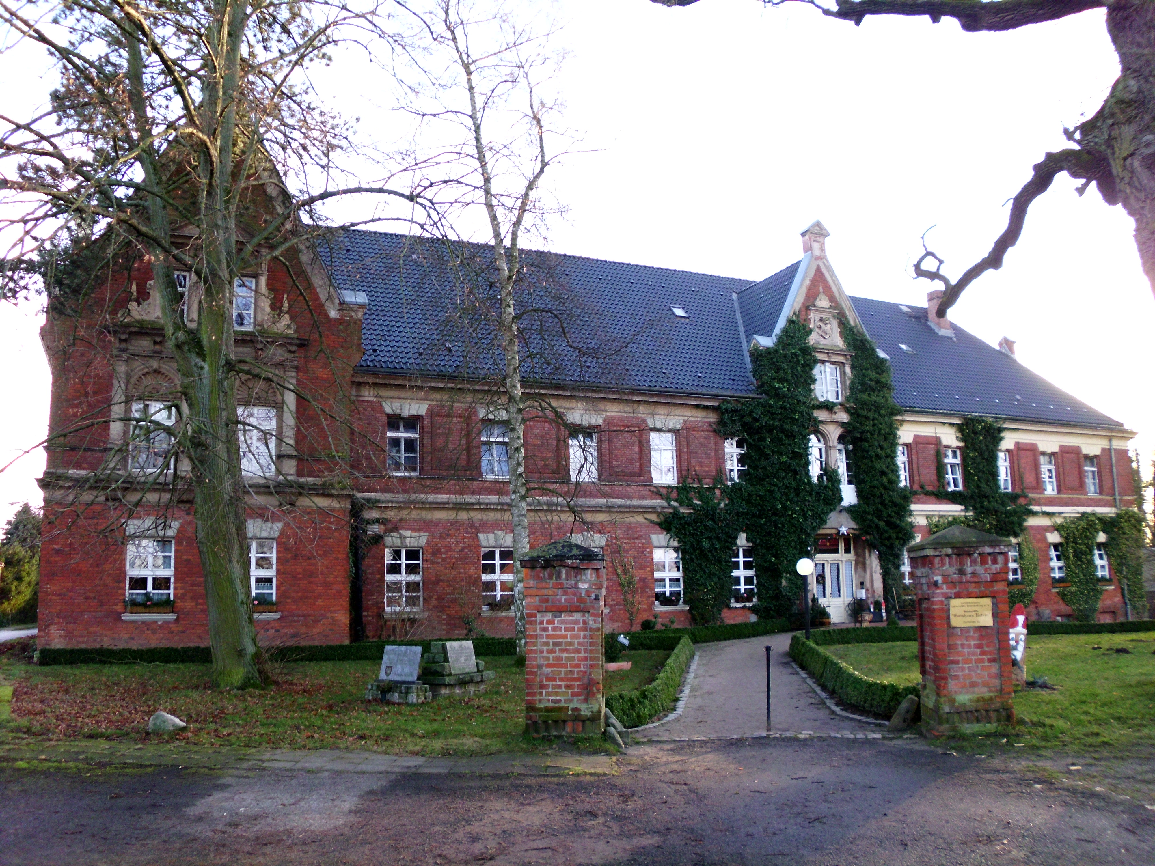 Schloss Retzin, Gemeinde Groß Pankow, Landkreis Prignitz